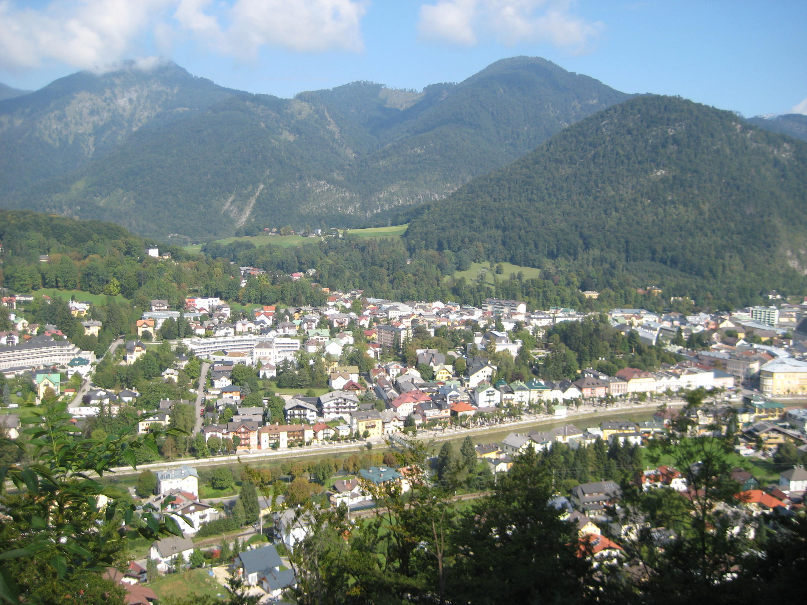 Blick auf Bad Ischl vom Aussichtsturm des Siriuskogl